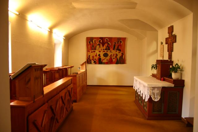 Oratorium (Gebetsraum) im Franziskanerkloster Villach